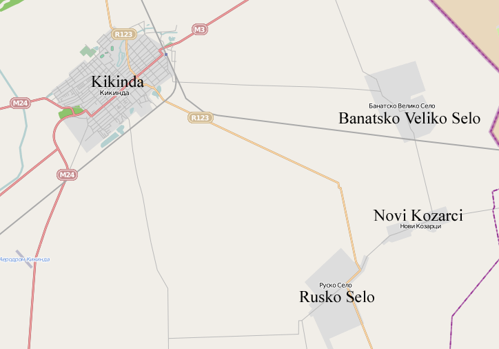 Mapa Kikinde i okolnih naselja.